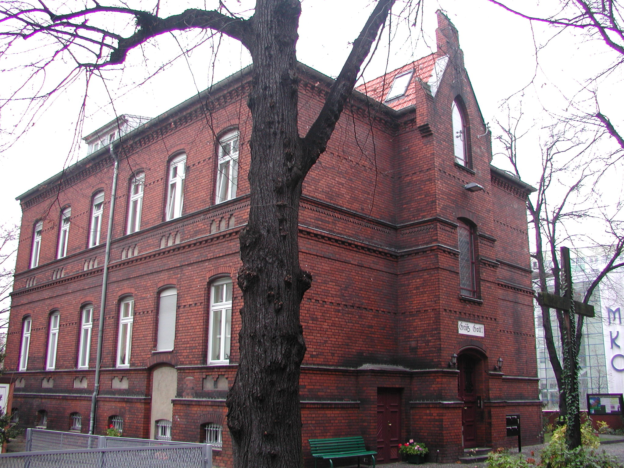 Pfarrhaus des Mauritiuskirch-Ensembles